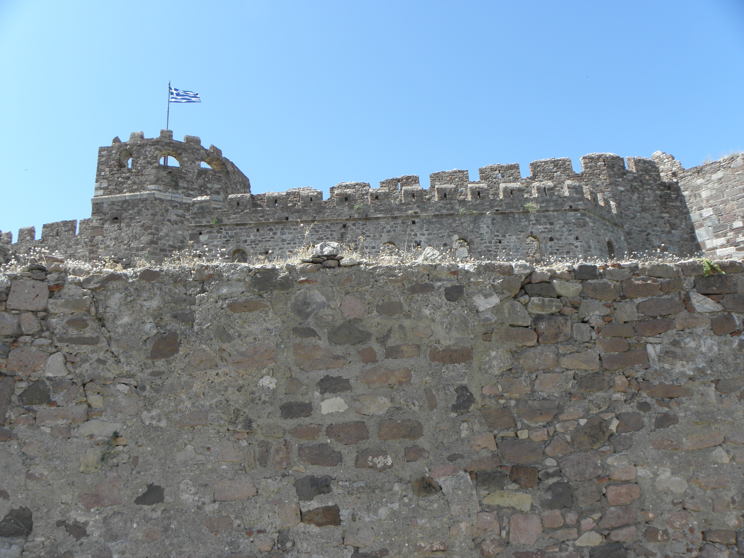 Pevnost v Mytiléně, Lesbos